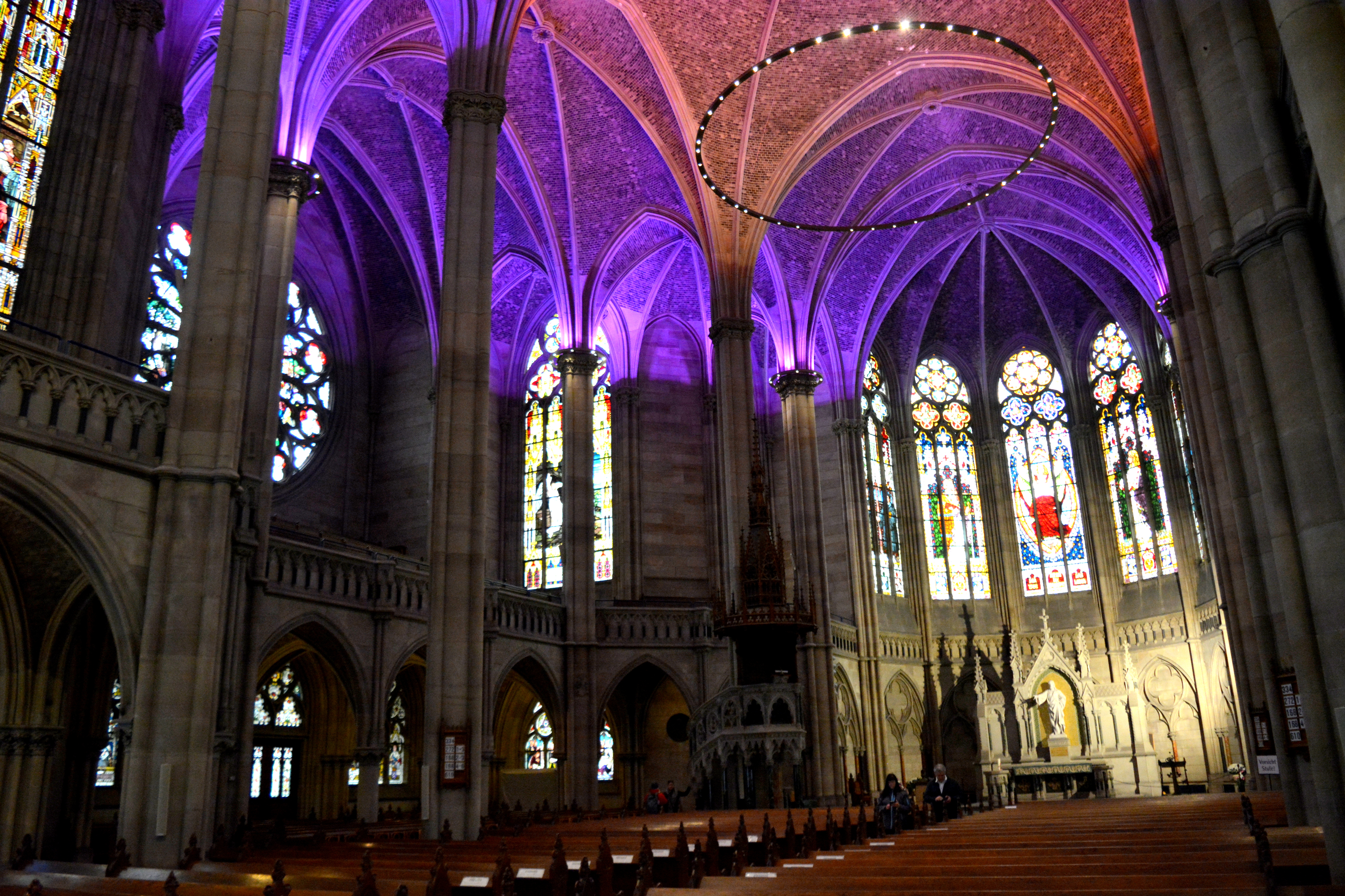 Protestantske Gedächtniskirche fan Spiers, ynterieur